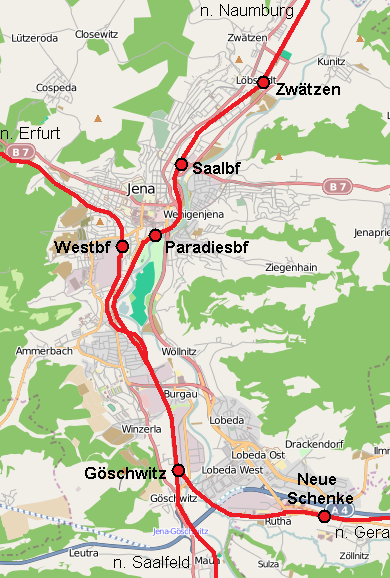 Lage der Bahnhöfe im Stadtgebiet von Jena.